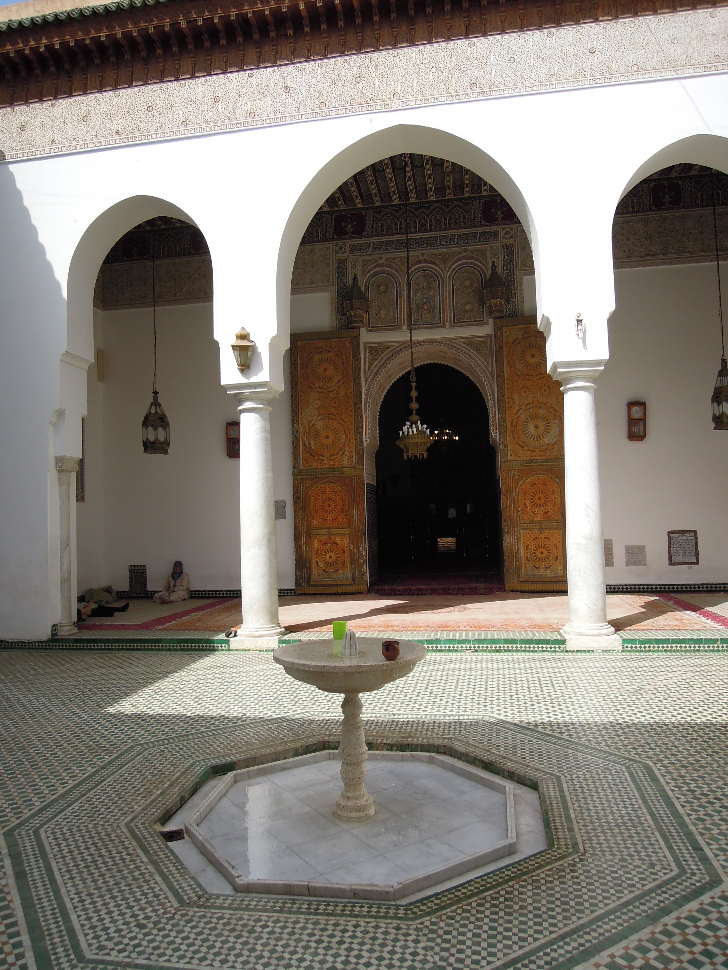 Vue de la cour intérieure, de la petite fontaine de marbre et de l'entrée intérieure du mausolée de la Zaouïa de Sidi Bel Abbès